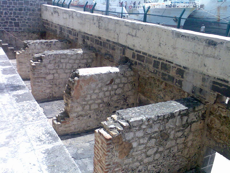 Latrines at Aapravasi Ghat in Mauritius.